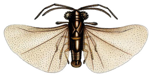 Male Caenocholax fenyesi, Myrmecolacidae, Strepsiptera